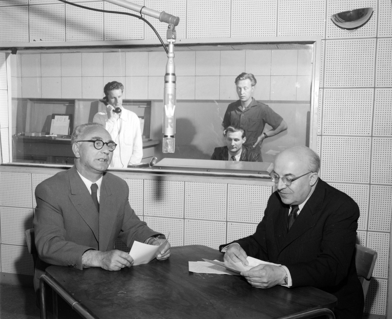 Der Wiener Bürgermeister Franz Jonas bei einer Ansprache im Studio des Senders Rot-Weiß-Rot. Mit am Tisch sitzt der Kommentator Vincenz Ludwig Ostry. Im Hintergrund ist der Regie- und Kontrollraum mit Technikern zu sehen.